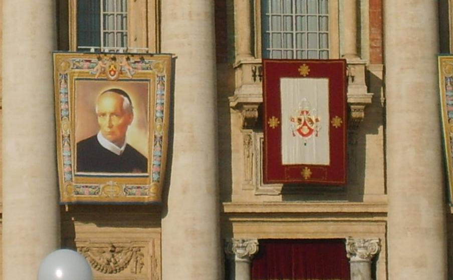 Il vessillo con il ritratto di San Gaetano Errico nel giorno della canonizzazione.